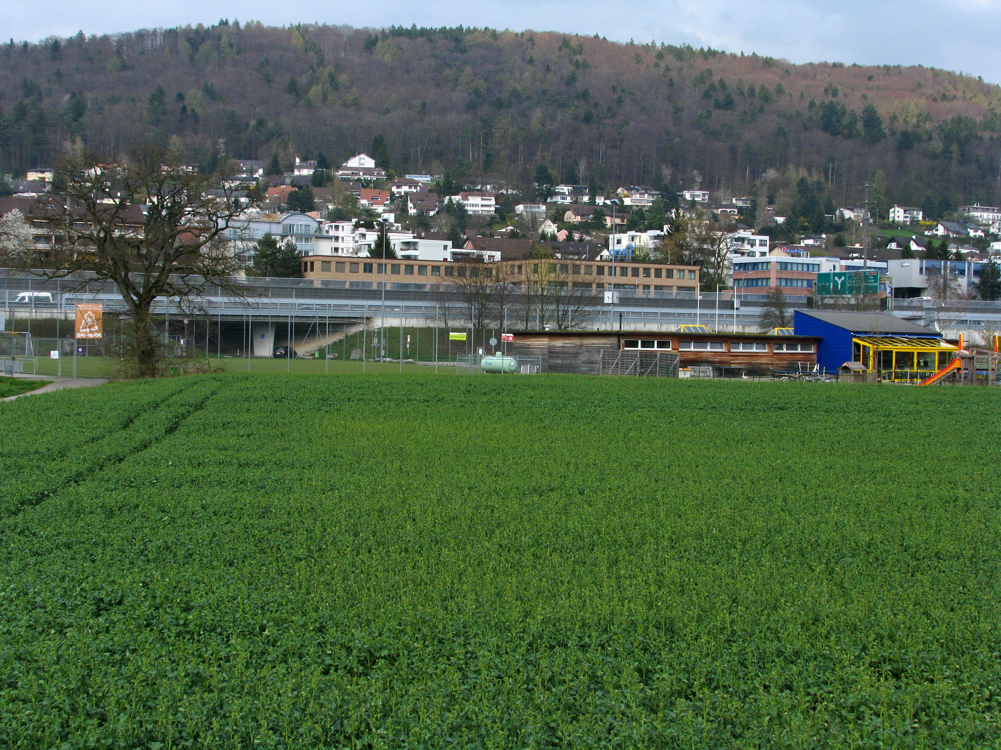 Limmatuferweg in Geroldswil